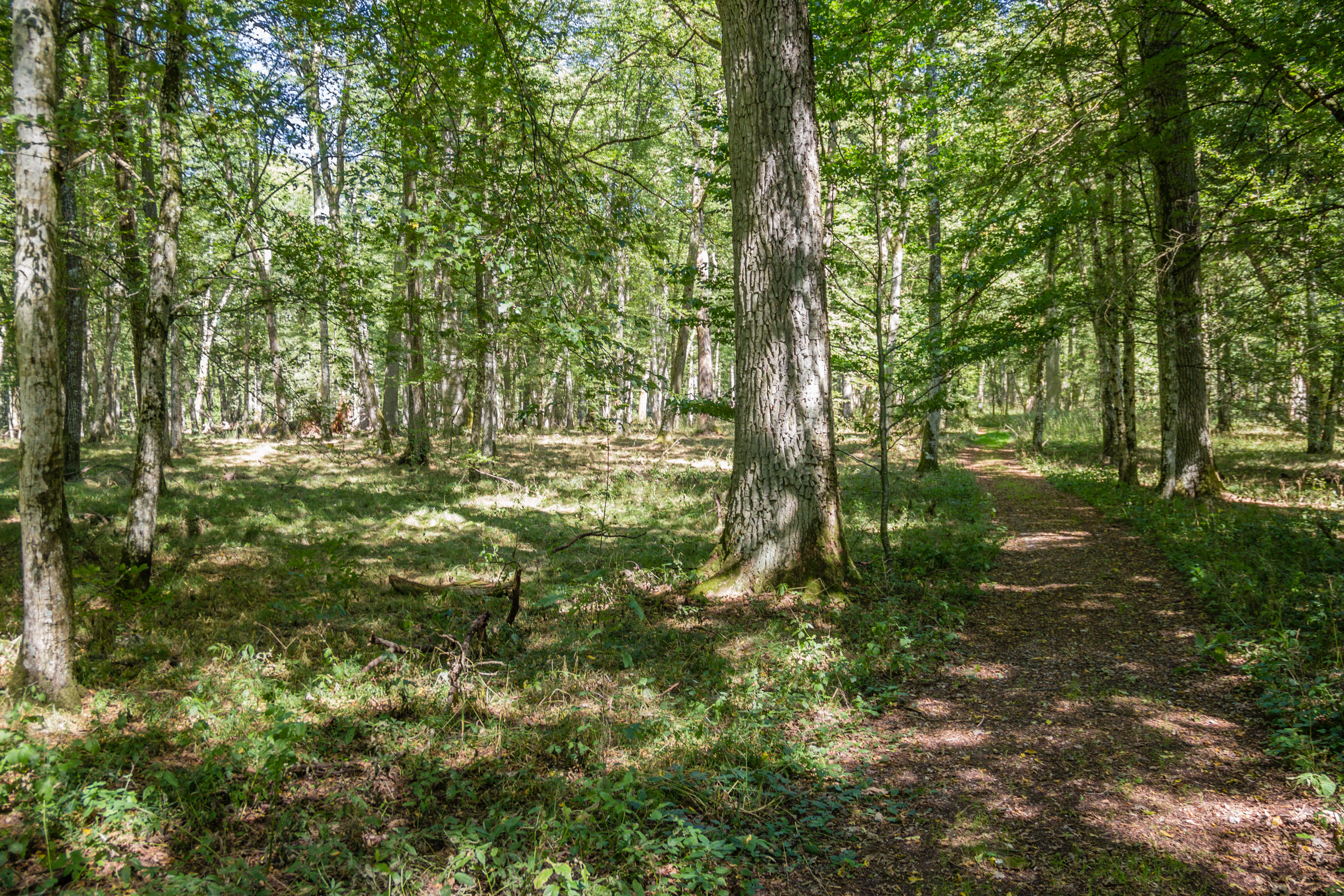 Naturschutzgebiet, Eichen-Hainbuchenwald Laubenbuch bei Rothenstein, Landkreis Weißenburg-Gunzenhausen